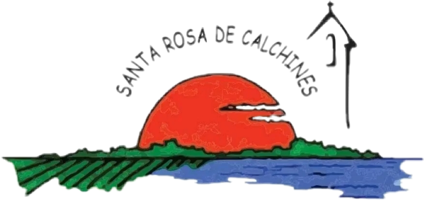 Logo de Santa Rosa de Calchines